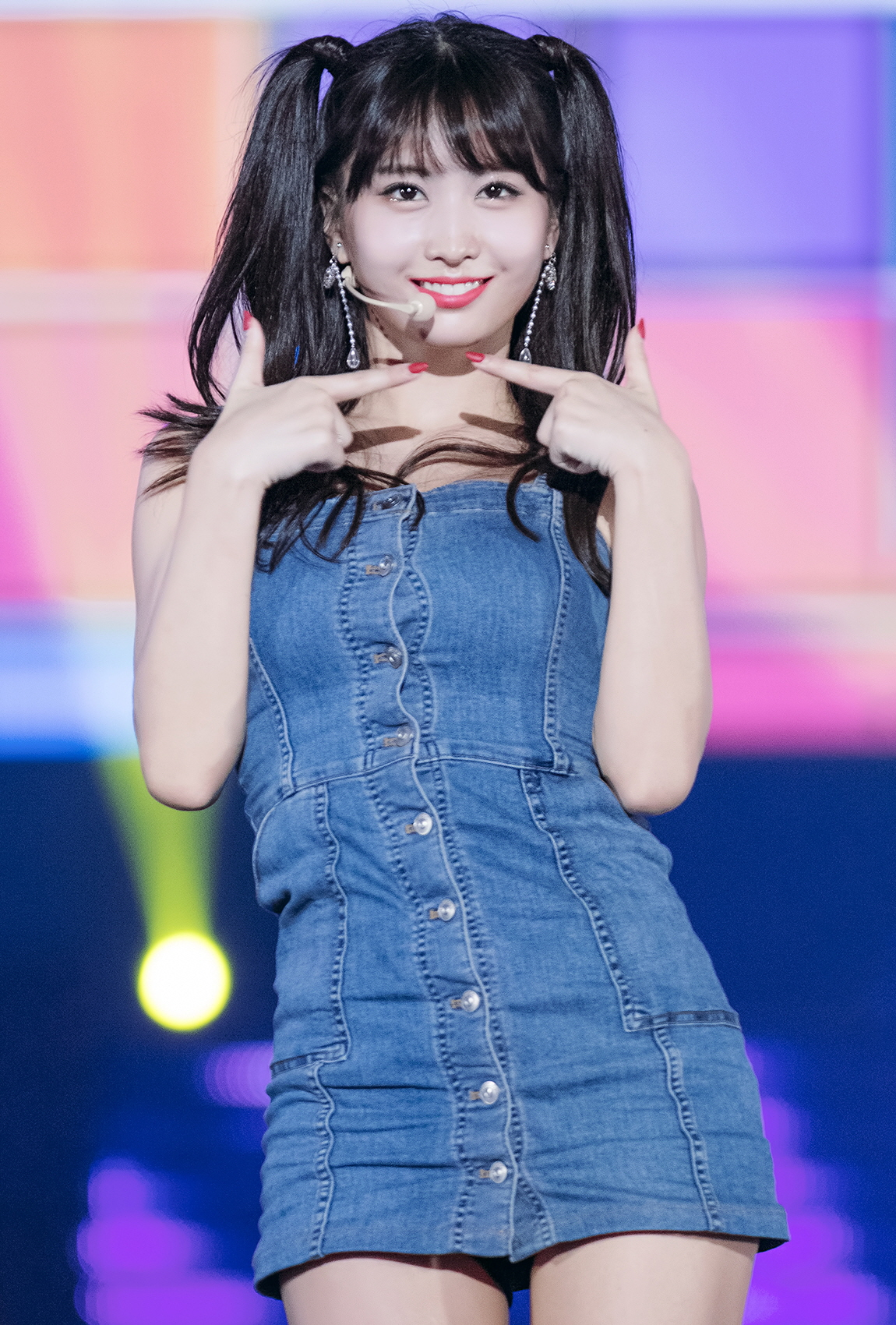 180717 열린음악회 트와이스